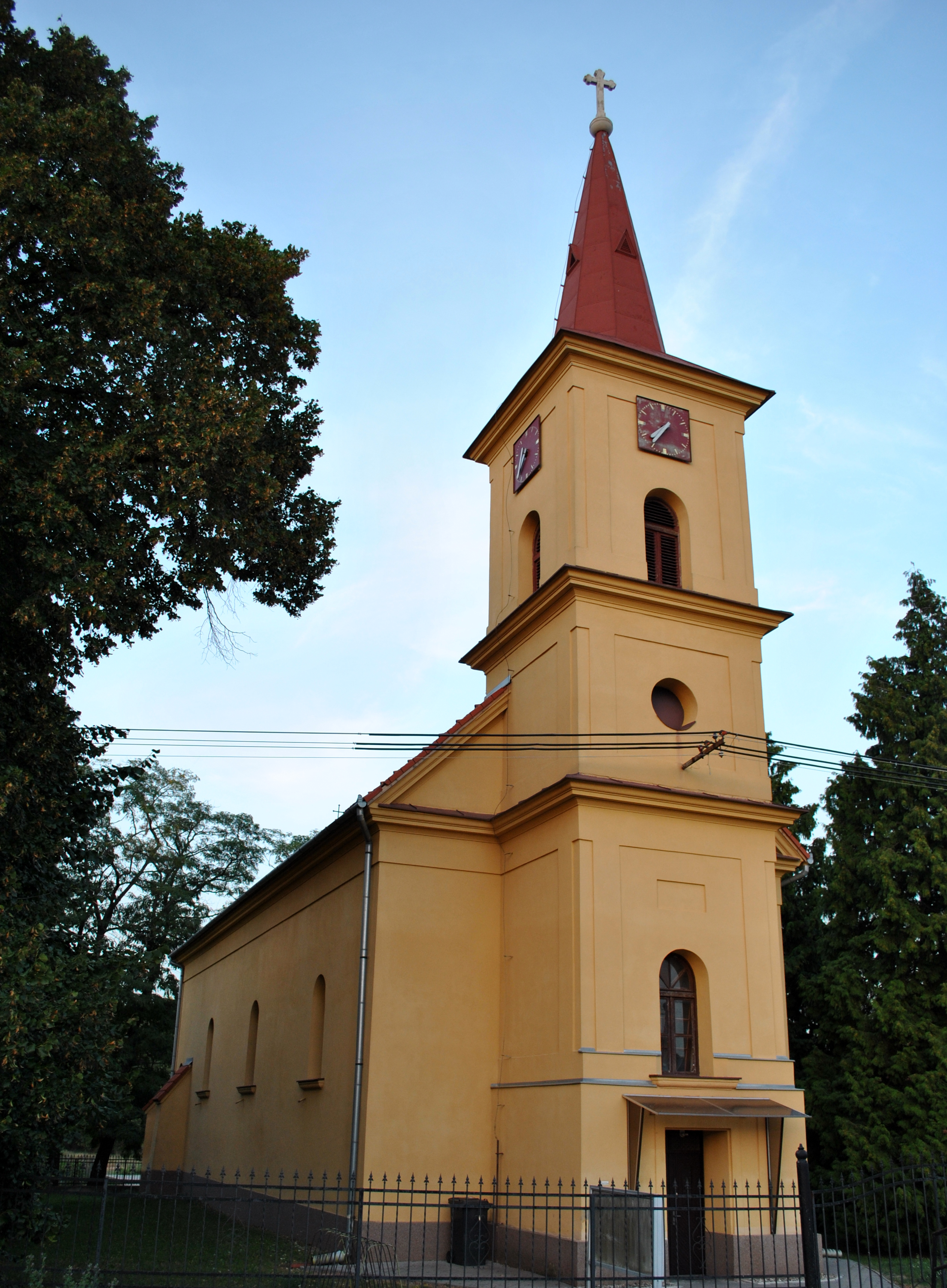 Újbars